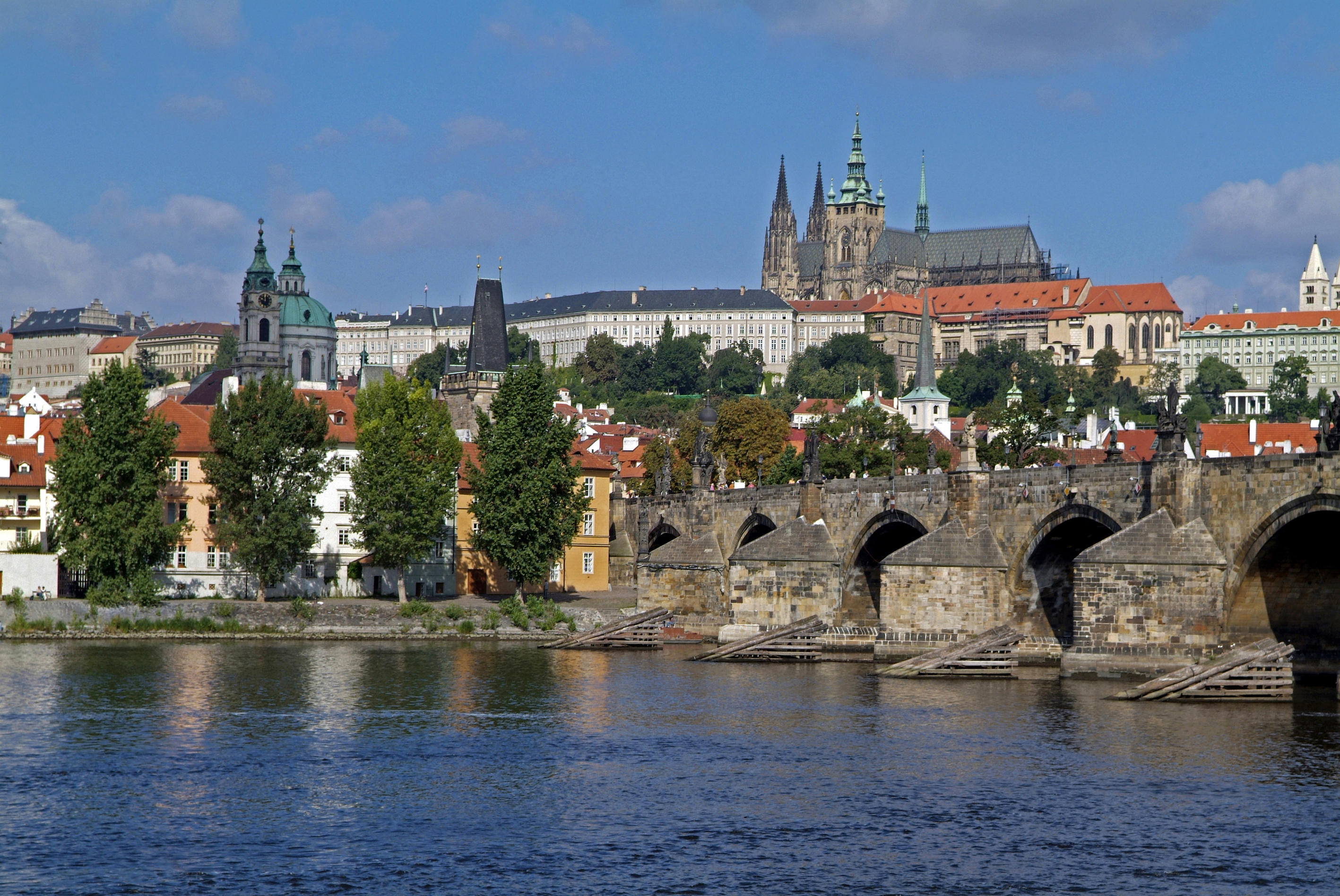 PONTE CARLO - PRAGA